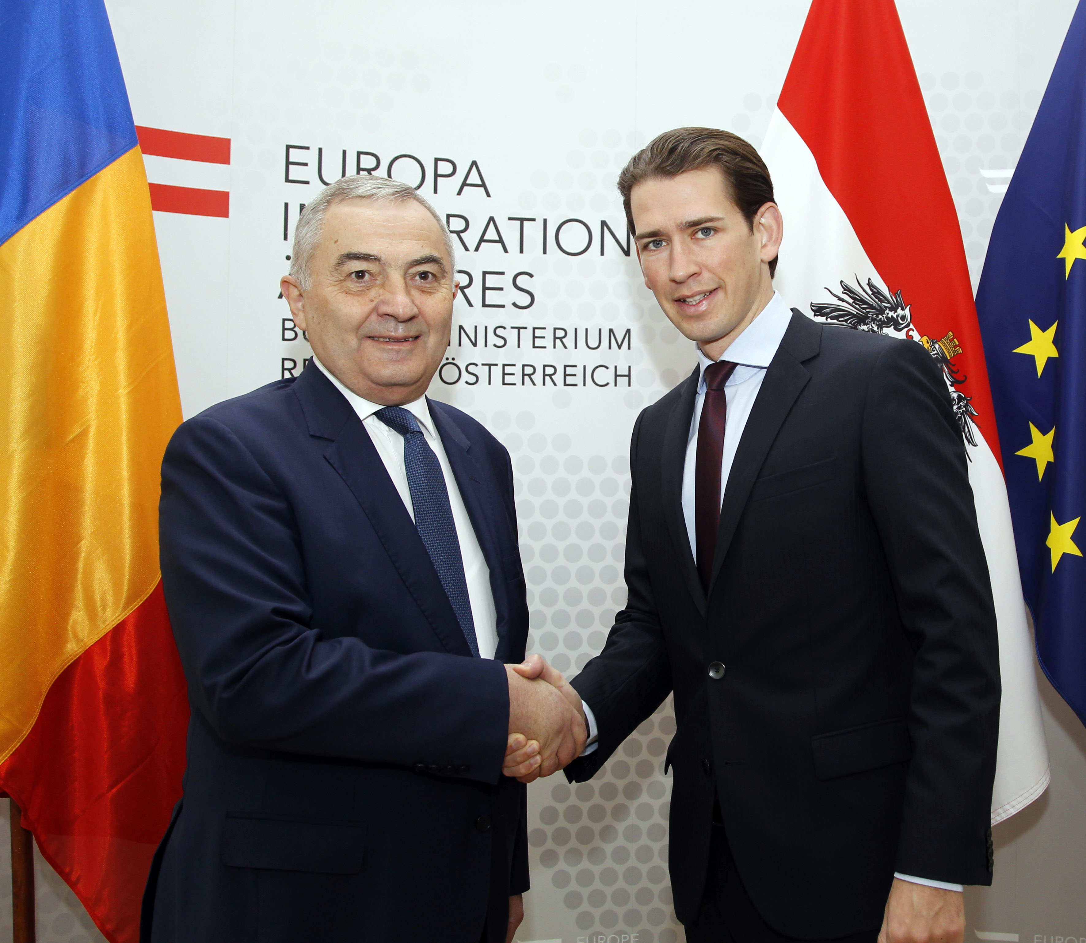 Montag, den 13. Juni 2016 traf Außenminister Sebastian Kurz im Außenministerium in Wien mit dem Außenminister von Rumänien Lazar Comanescu, zu einem Arbeitsgespräch zusammen. Foto: Mahmoud